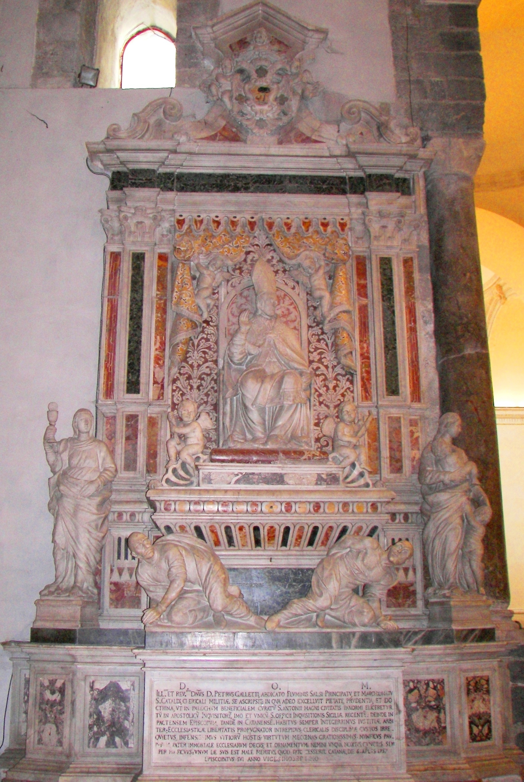 monumento marmoreo del vescovo di Catania Mons. Pietro Galletti, sec. XVIII